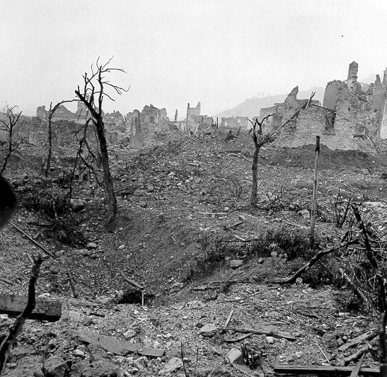 Rovine dell'Abbazia di Montecassino, 1944.